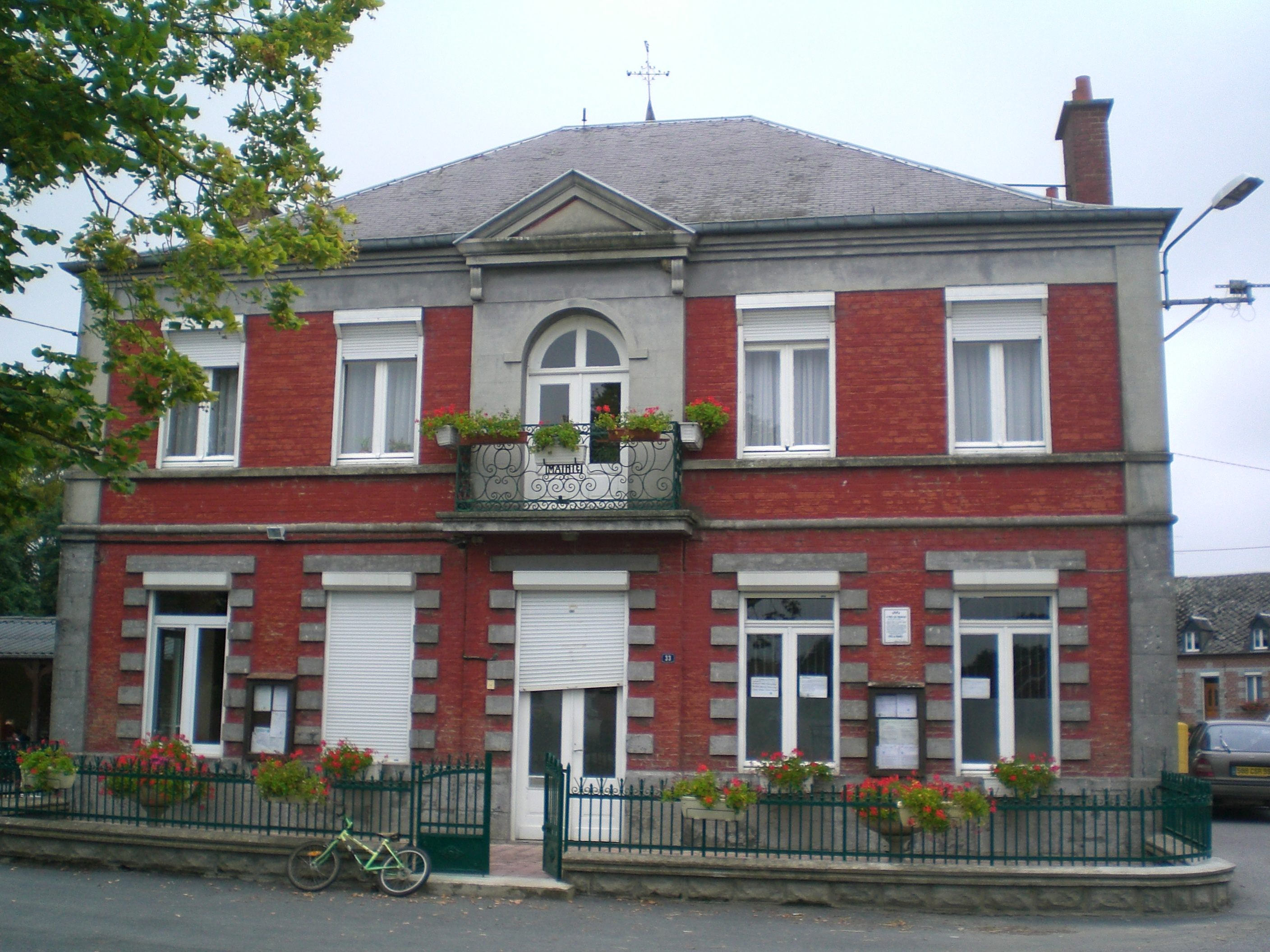 mairie de Petit-Fayt nord france